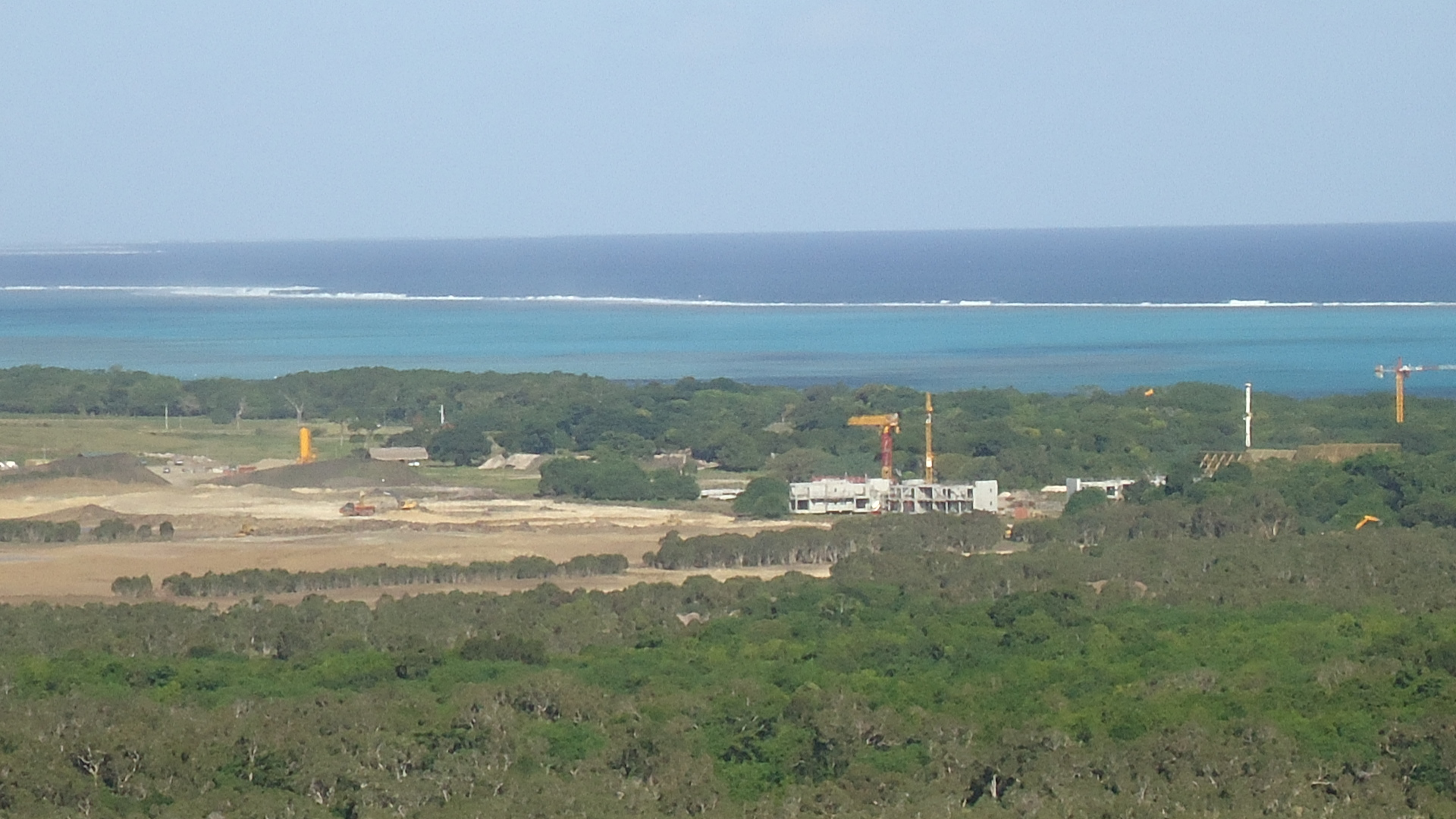 Travaux de l'hôtel Sheraton à Gouaro Deva